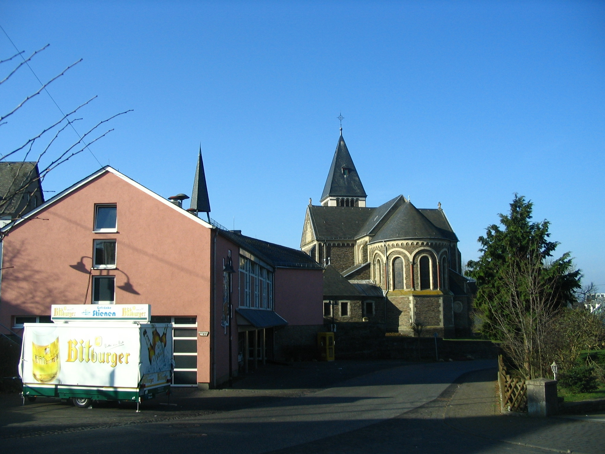 Kirche und Gemeindehaus von Buch im Hunsrück